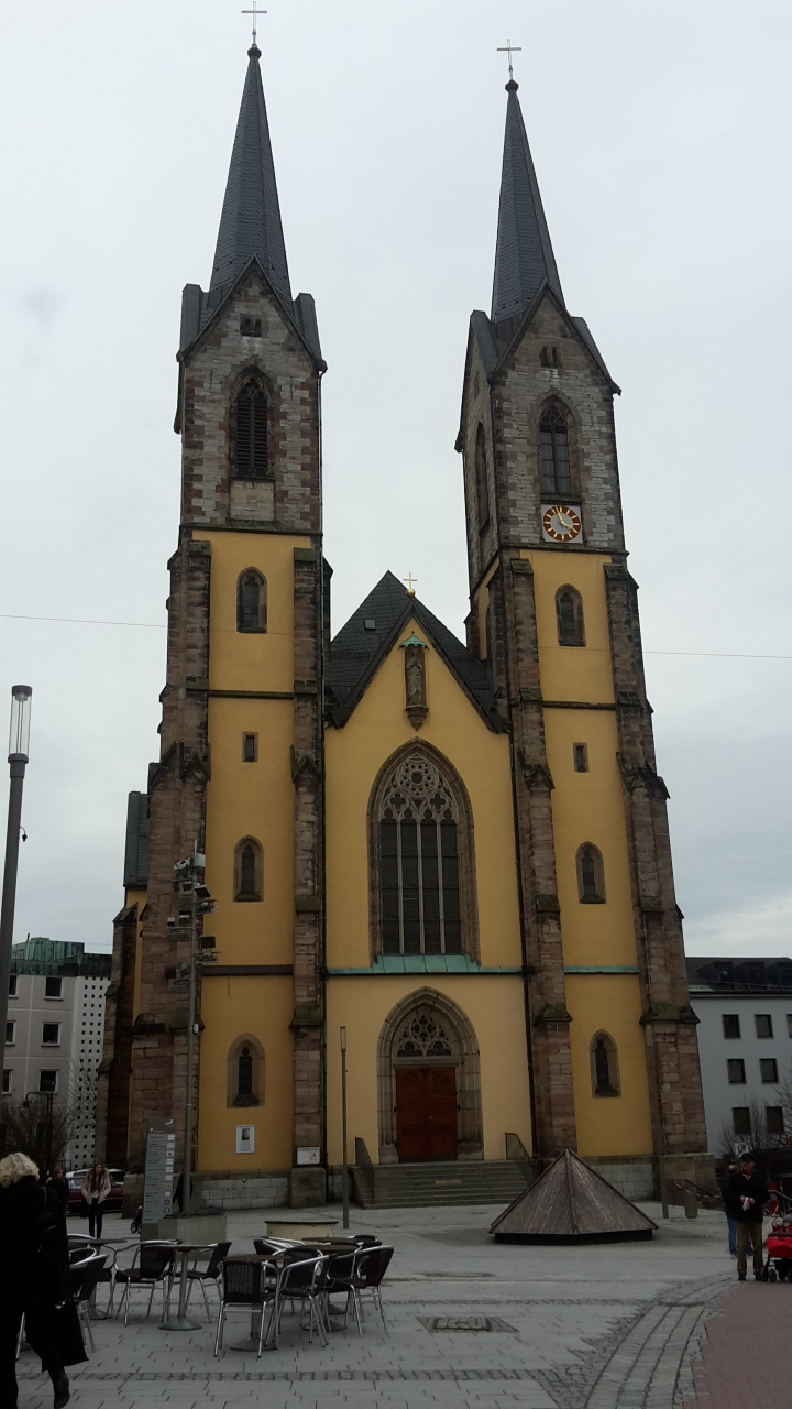 Saale'nin Hof'daki Azize Meryem Kilisesi.